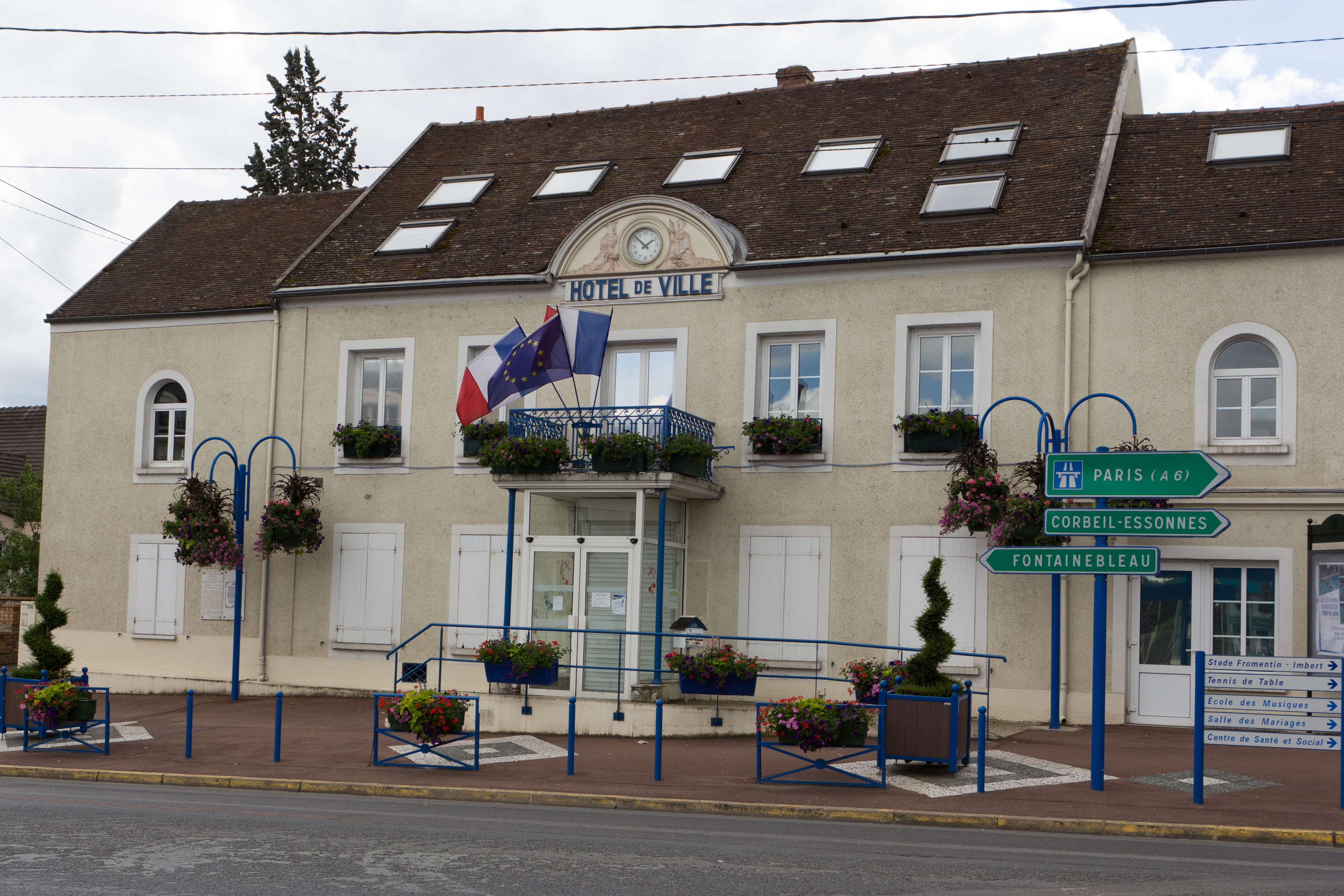 Hôtel de ville de Saint-Fargeau-Ponthierry, Saint-Fargeau-Ponthierry, Seine-et-Marne, France